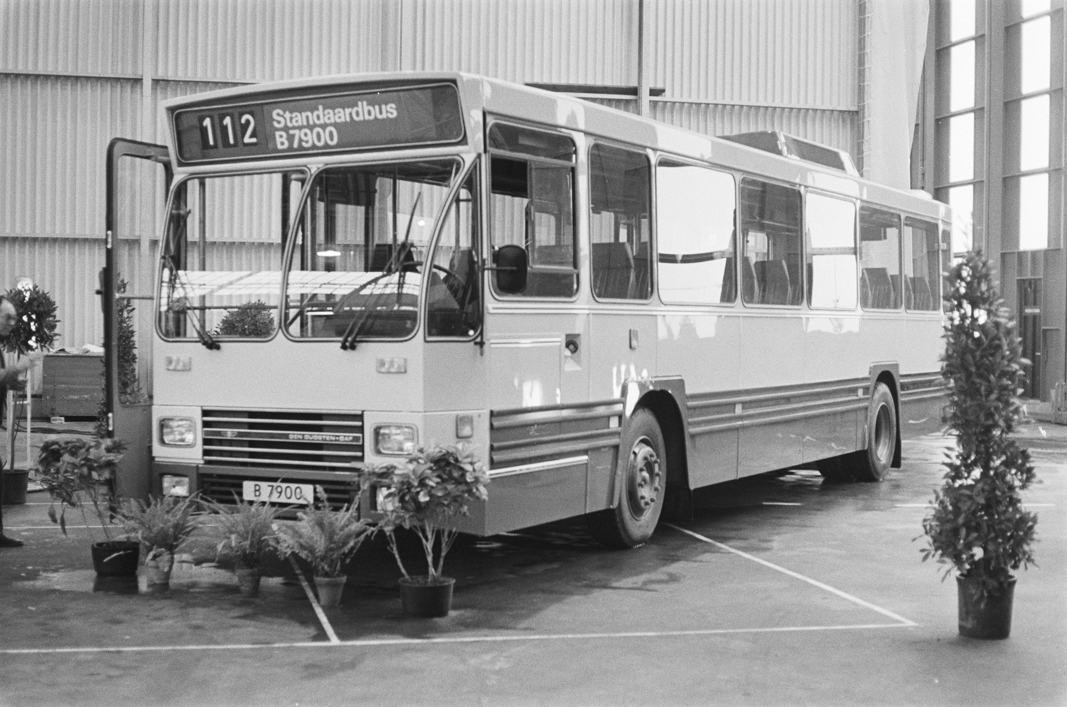 Collectie / Archief : Fotocollectie Anefo Reportage / Serie : [ onbekend ] Beschrijving : Nieuwe streekbus prototype B7900 Datum : 6 februari 1978 Fotograaf : Peters, Hans / Anefo Auteursrechthebbende : Nationaal Archief Materiaalsoort : Negatief (zwart/wit) Nummer archiefinventaris : bekijk toegang 2.24.01.05 Bestanddeelnummer : 929-5607